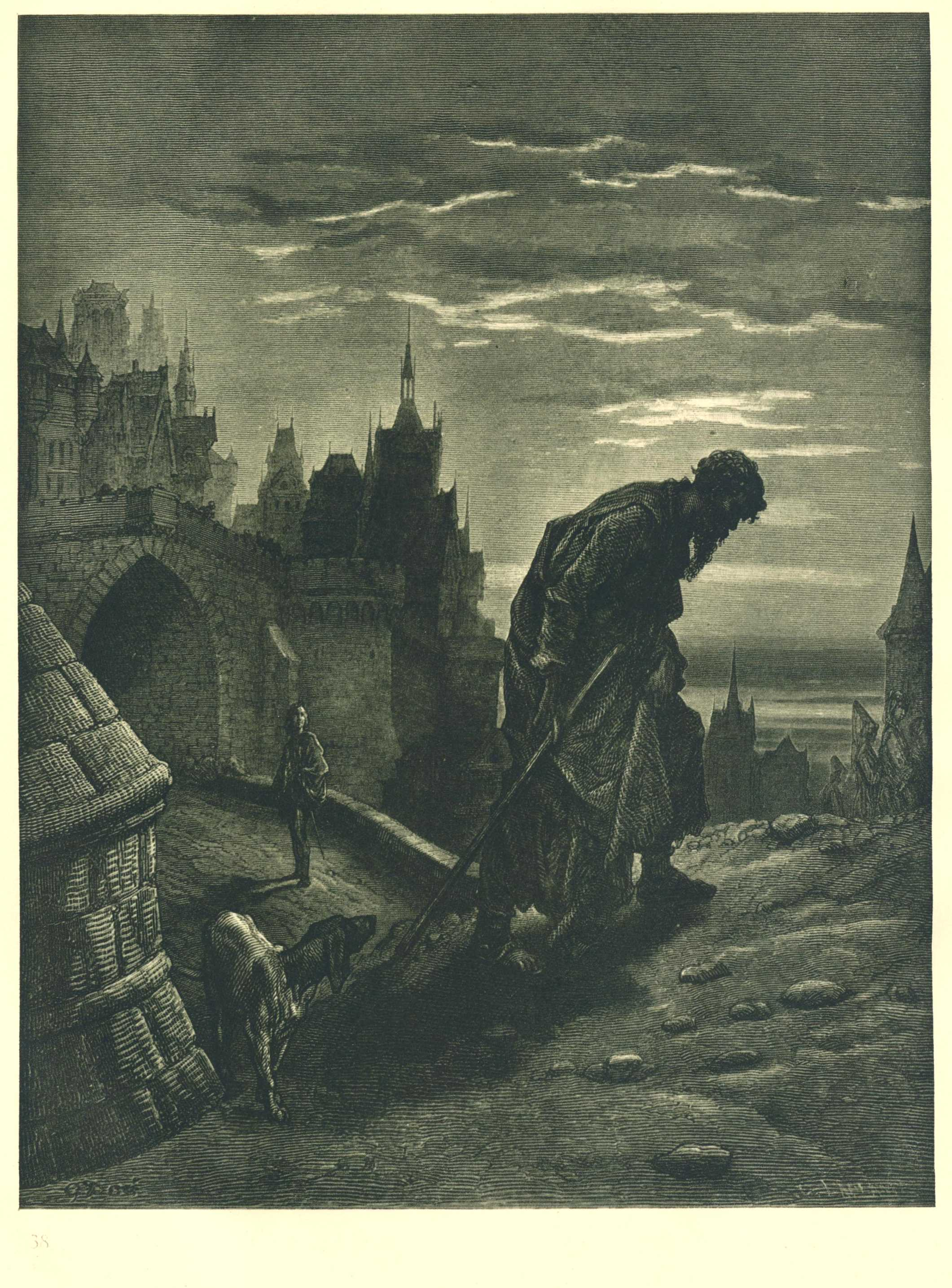 Der Seemann mit dem grauen Bart, er geht, und auch der Hochzeitsgast kehrt ernst nach Haus zurück (Beschreibung lt. Quelle)